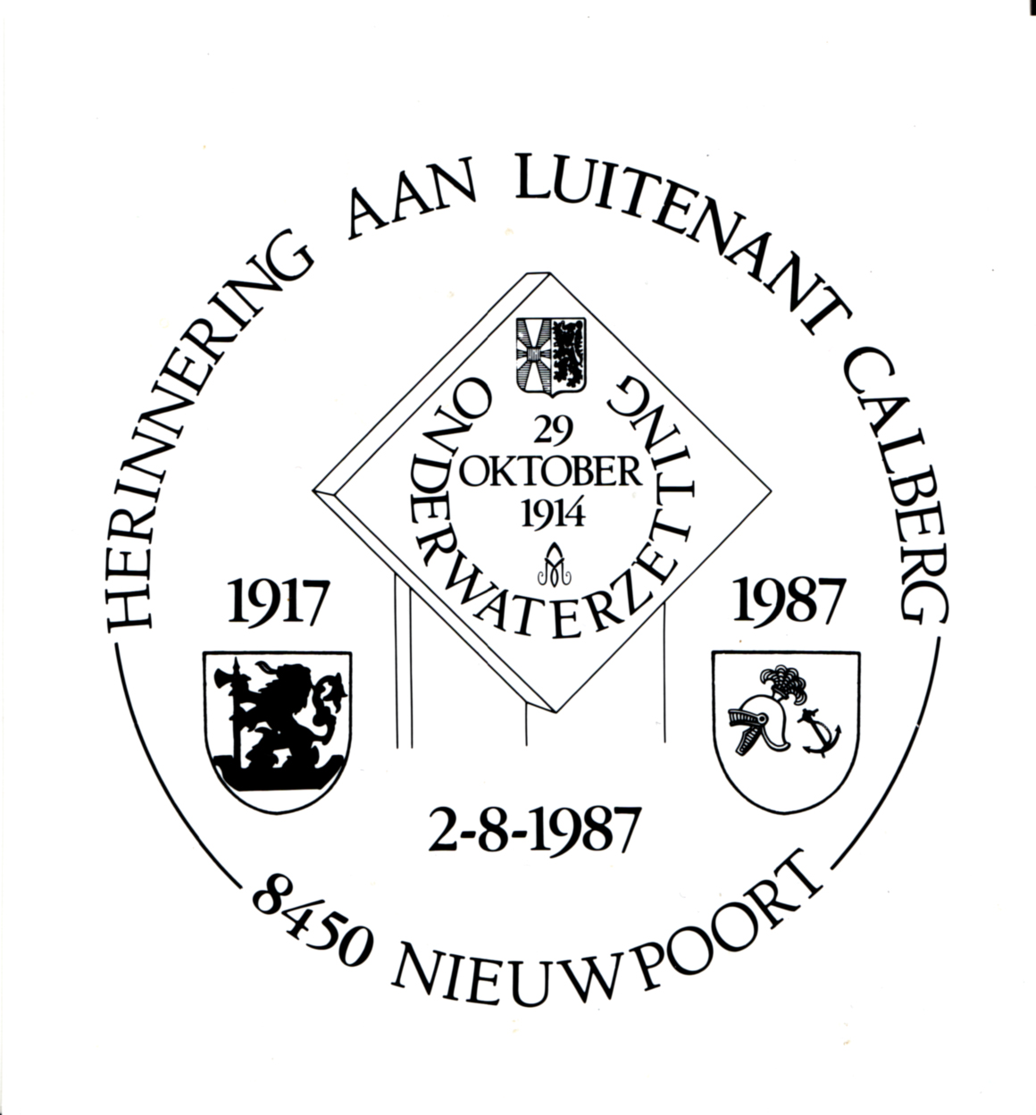 Een bpost poststempel met afbeelding van een herdenkingssteen en wapenschild van Nieuwpoort en van de Compagnie Sapeurs- Pontonniers